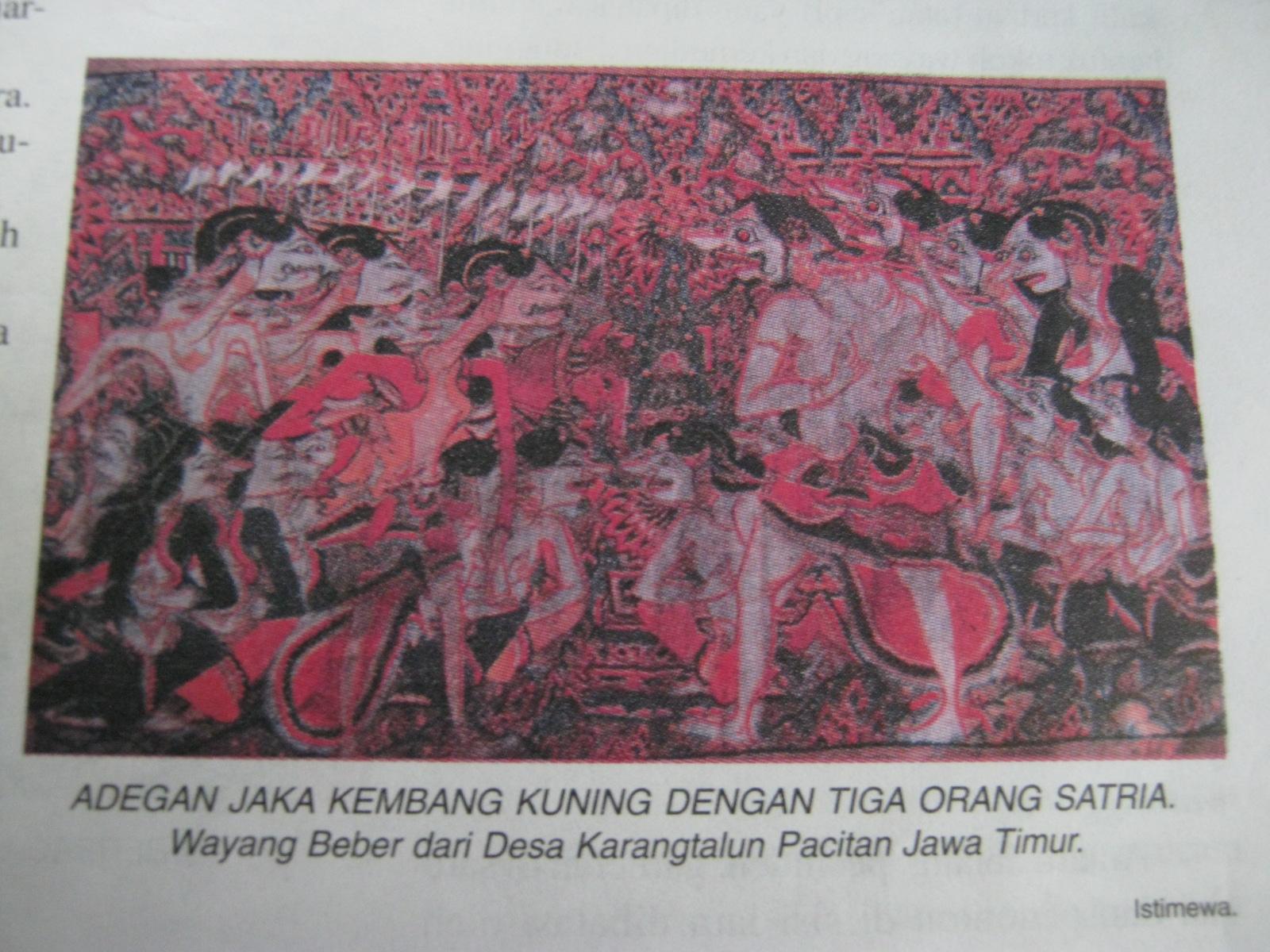 Basa Jawa: Wayang Beber critane PanJi